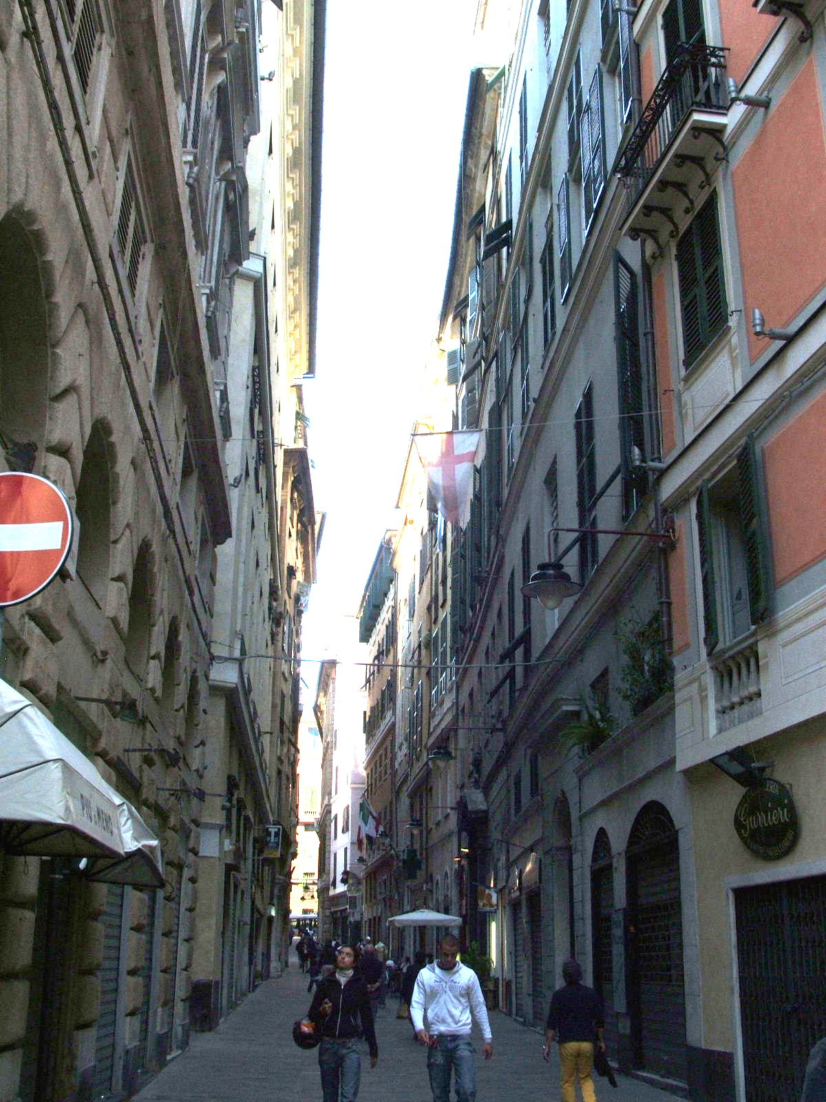 Genova Via Lomellini, sede del Museo del Risorgimento e dell'Istituto Mazziniano